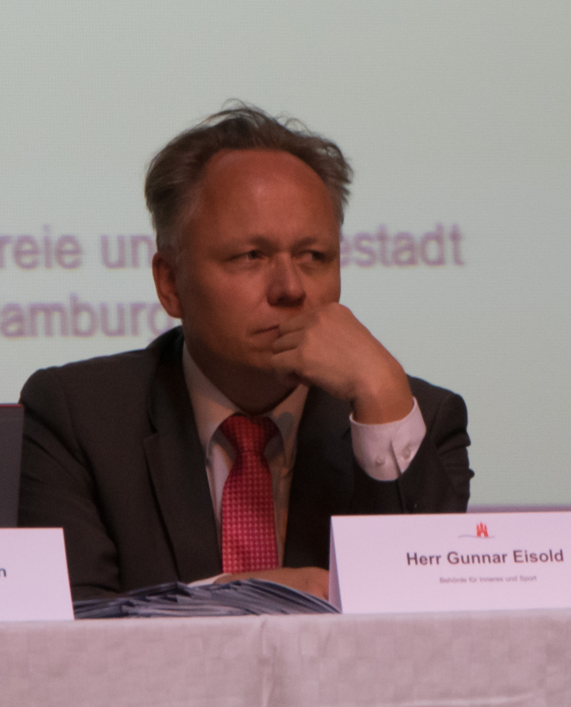 Gunnar Eisold auf einer Infoveranstaltung zur Einrichtung der ZEA in HH-Meiendorf 2015